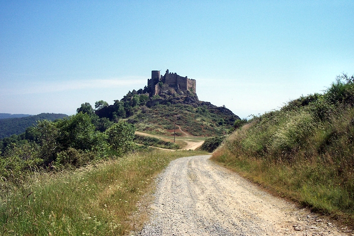 Château de Couzan (XIème Siècle)